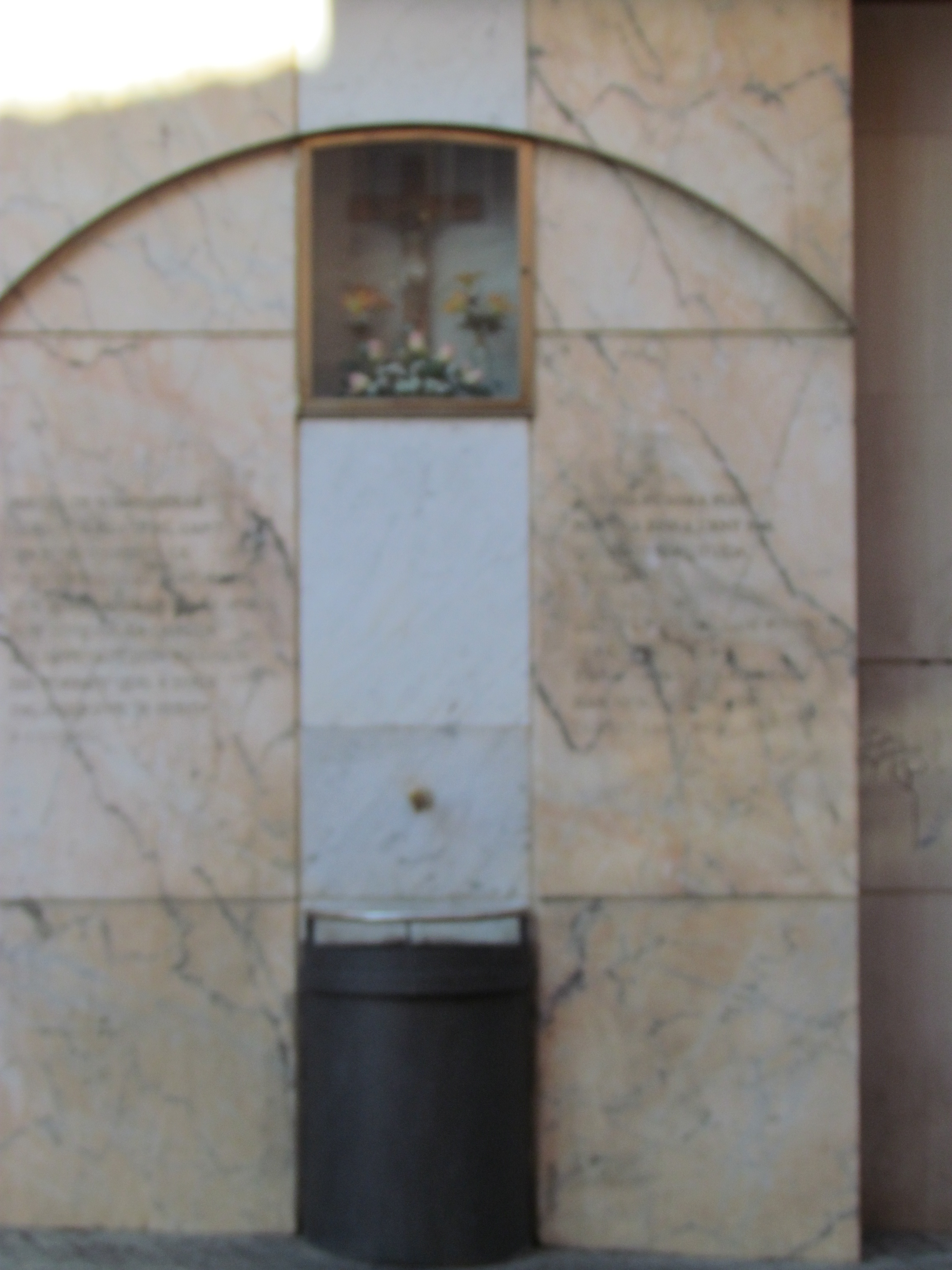 Font i capelleta del Sant Crist (Mataró)